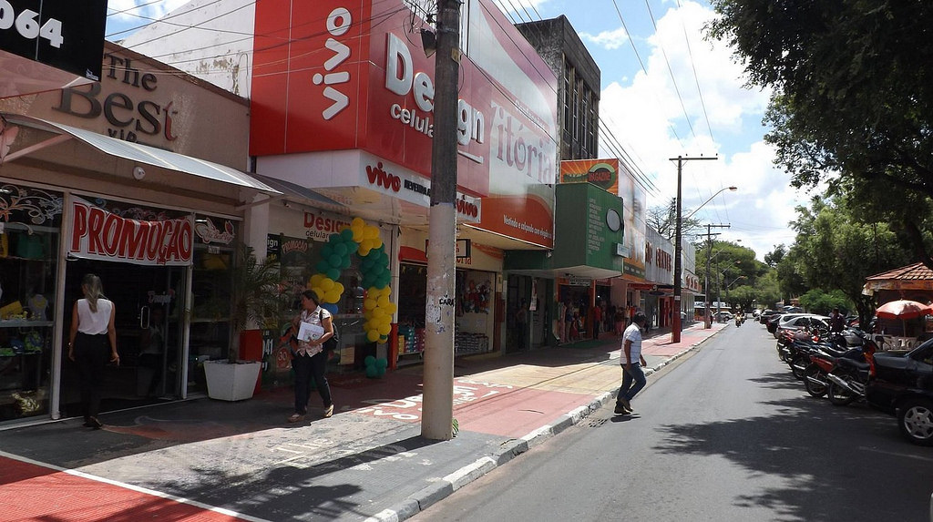 Av. Jaime Brasil – Centro, Boa Vista – RR